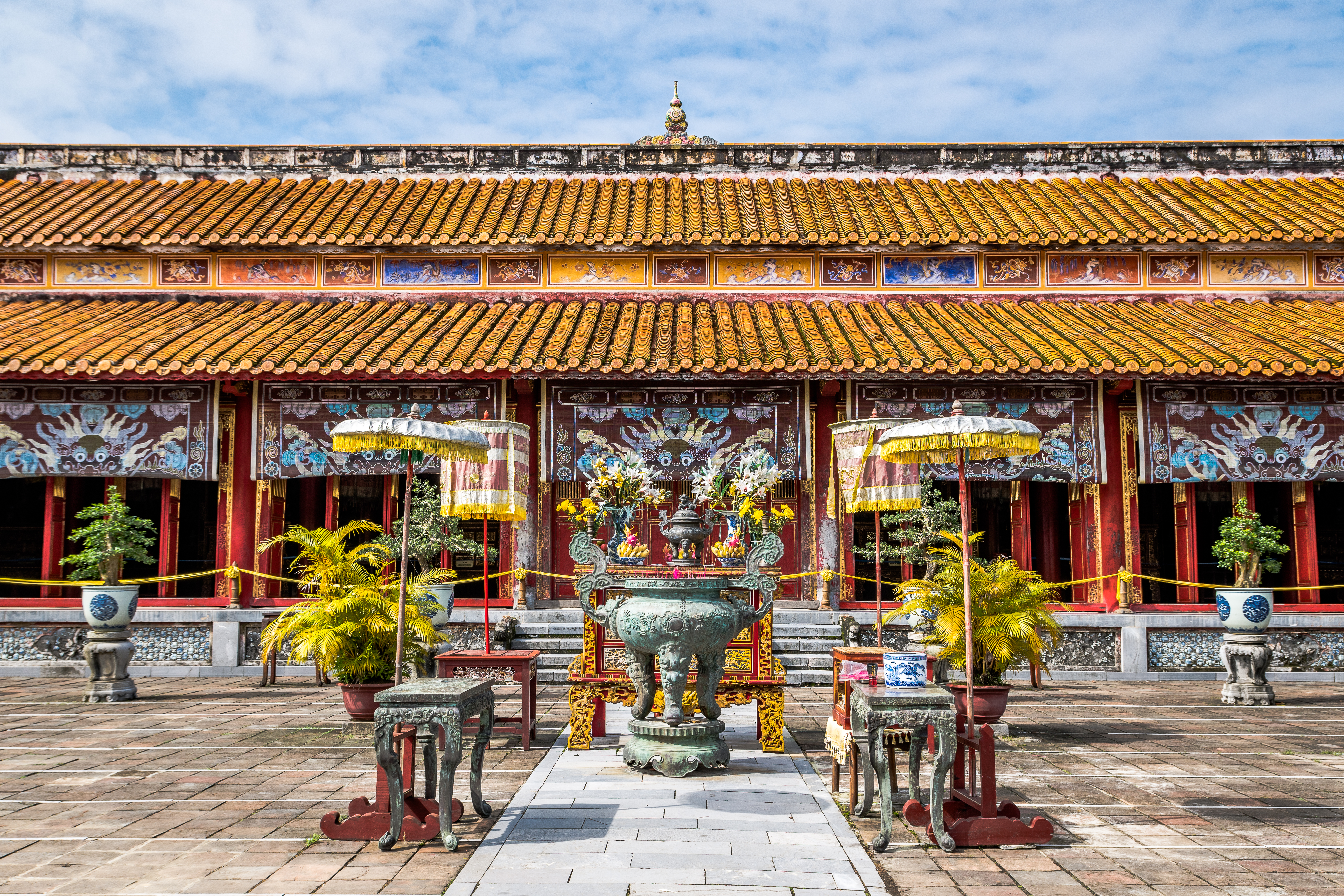 Citadelle de Hue